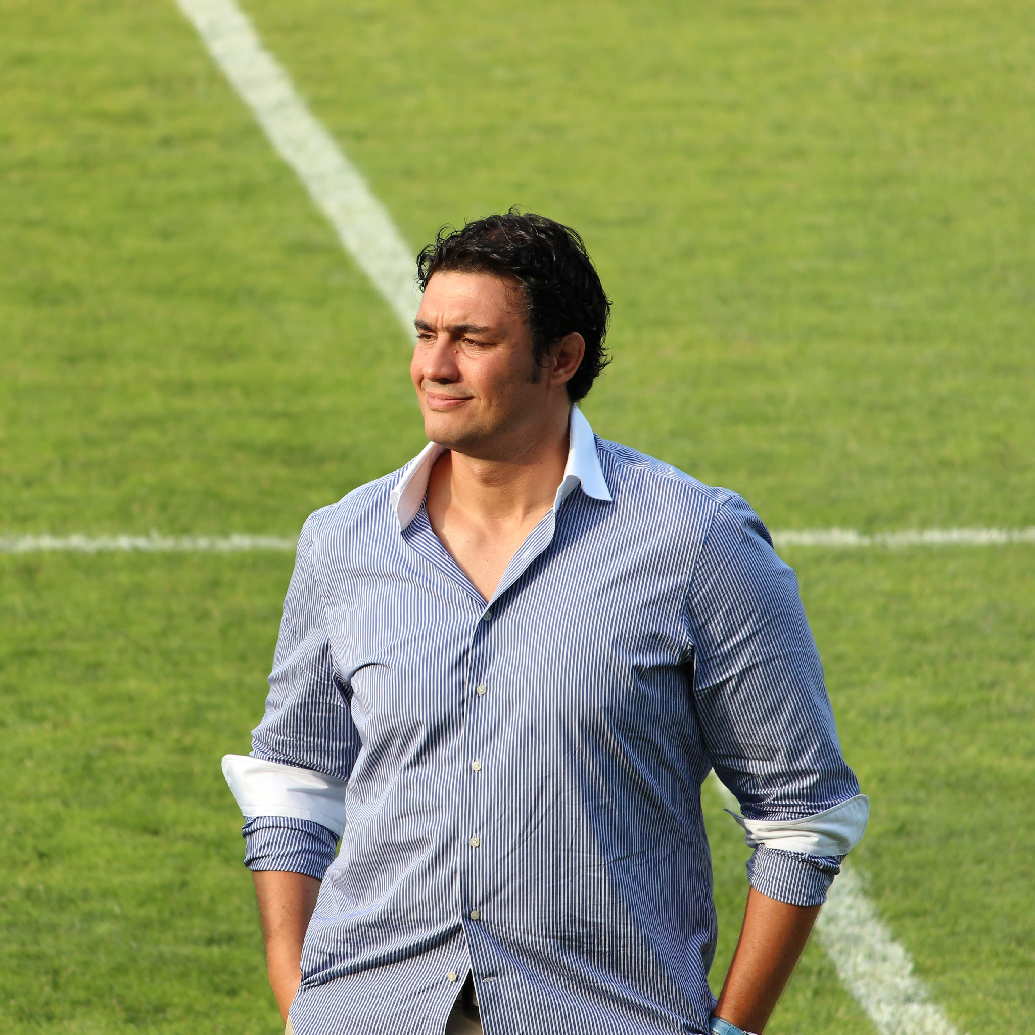 Joueurs du Castres Olympique lors de la présentation de l'équipe pour la saison 2015-2016